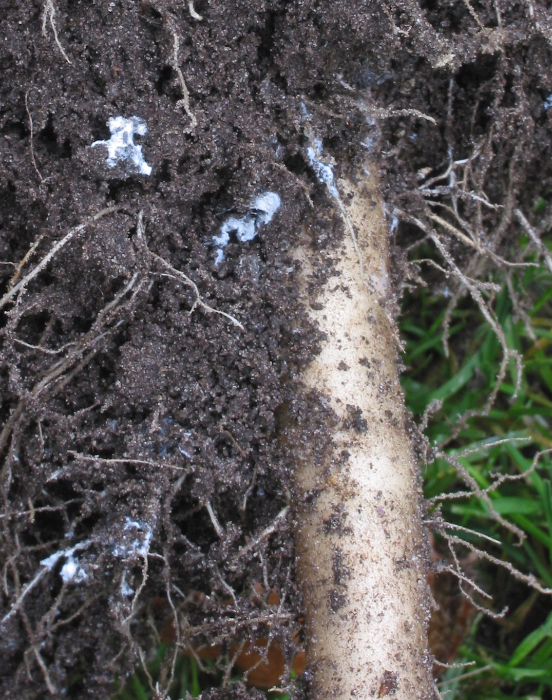 zelfgemaakte foto van wortelluis op witlof; half oktober